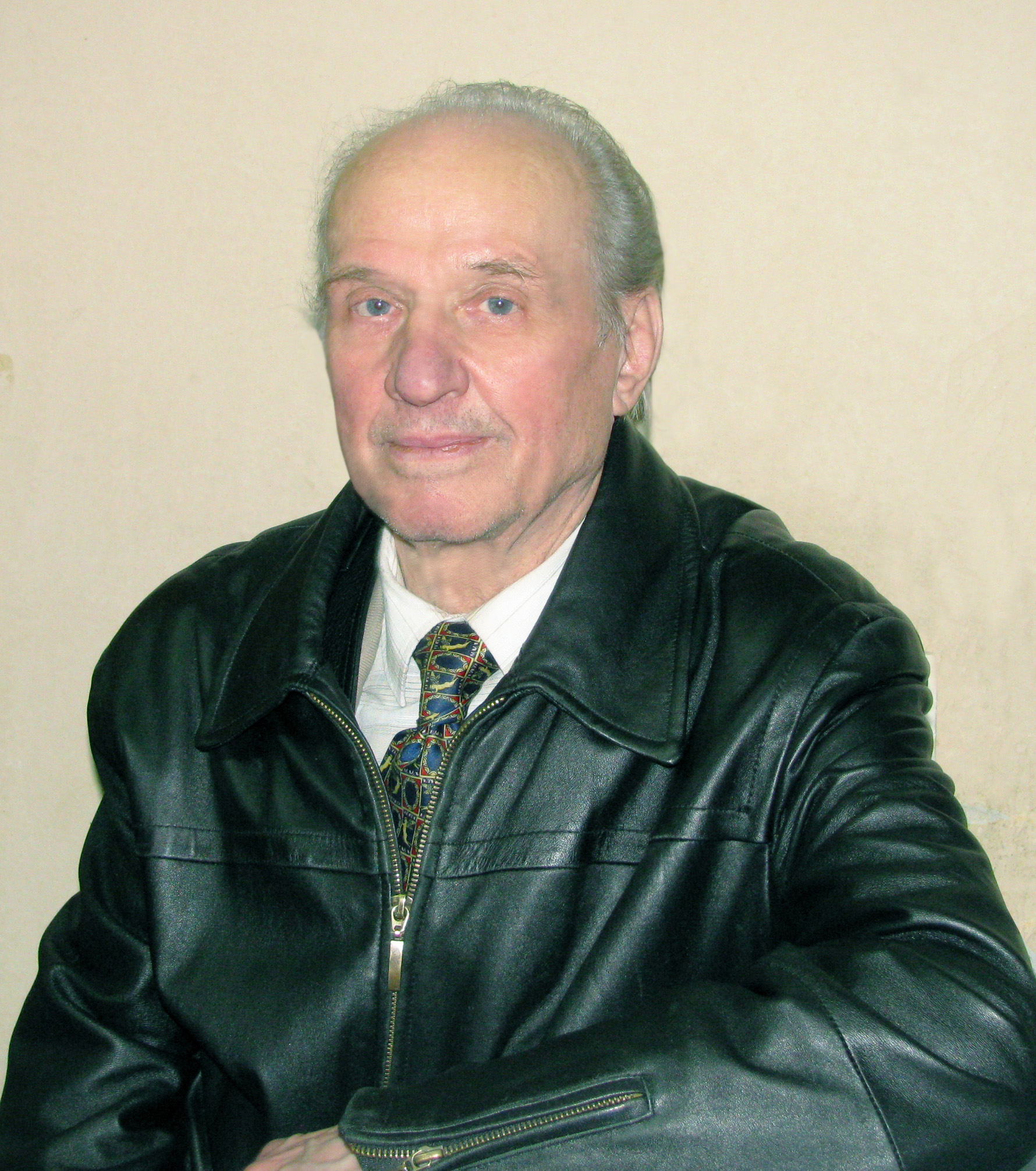 Виталий Федосович Медведев